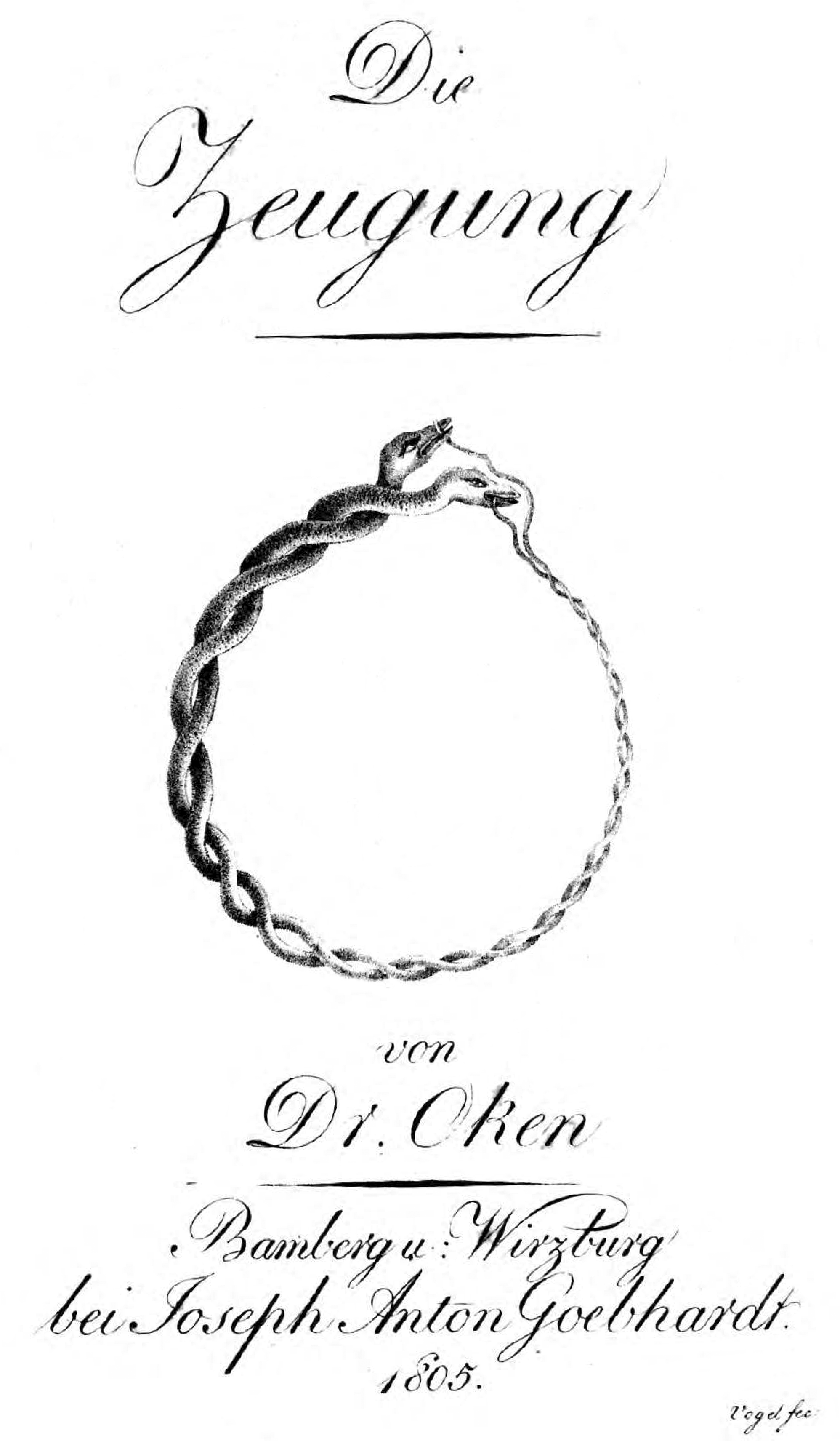 Die Zeugung